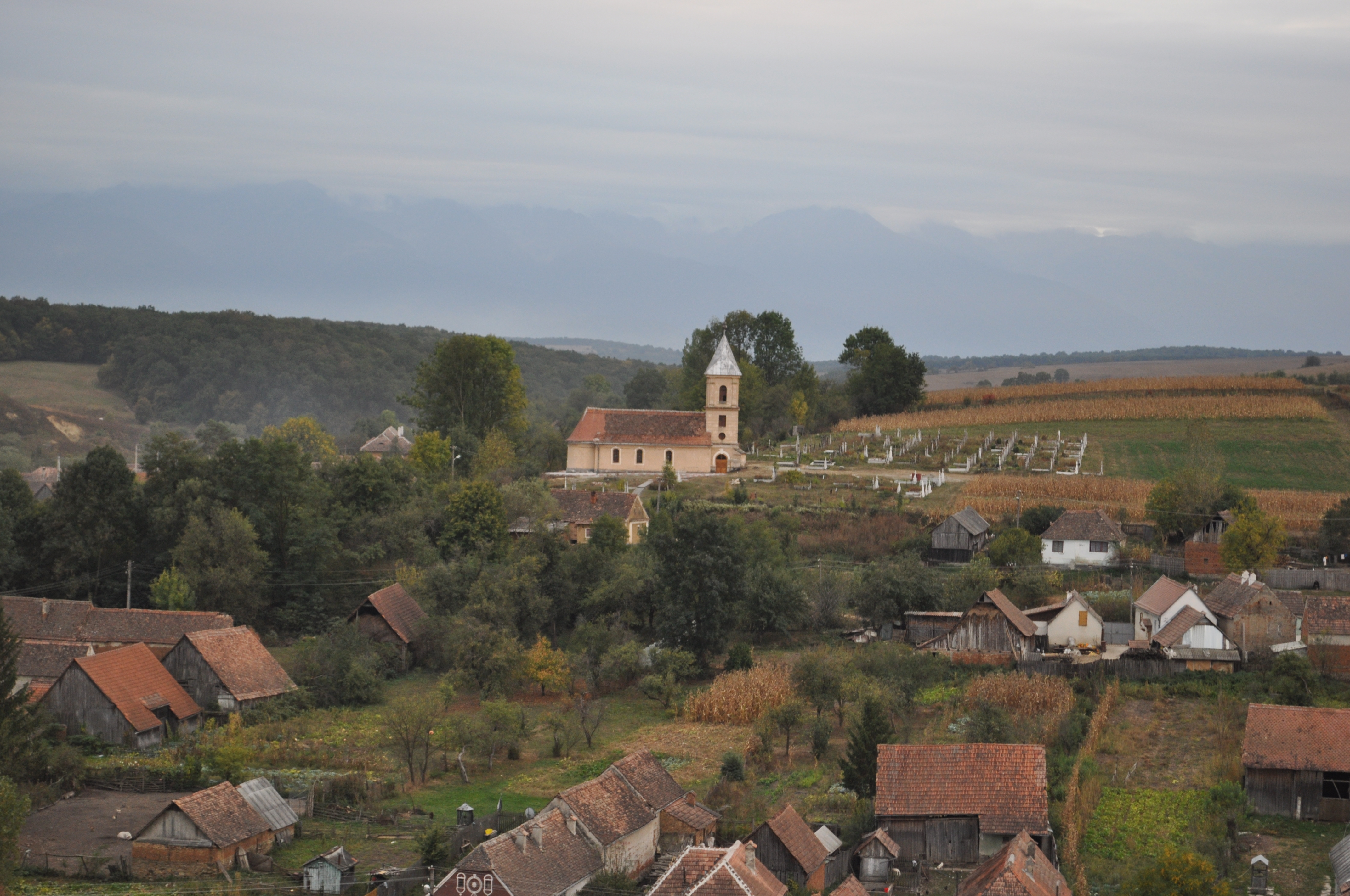 Biserica „Înălţarea Domnului"